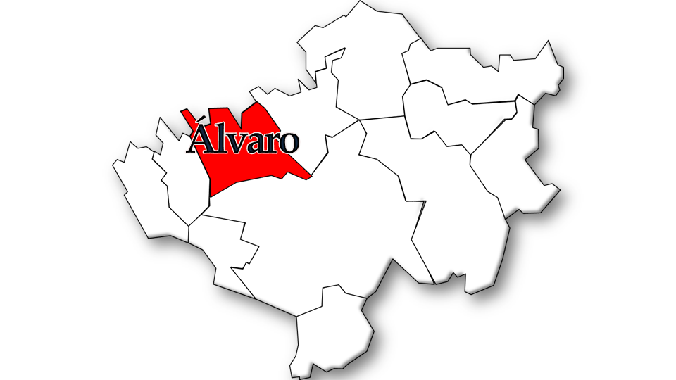 População